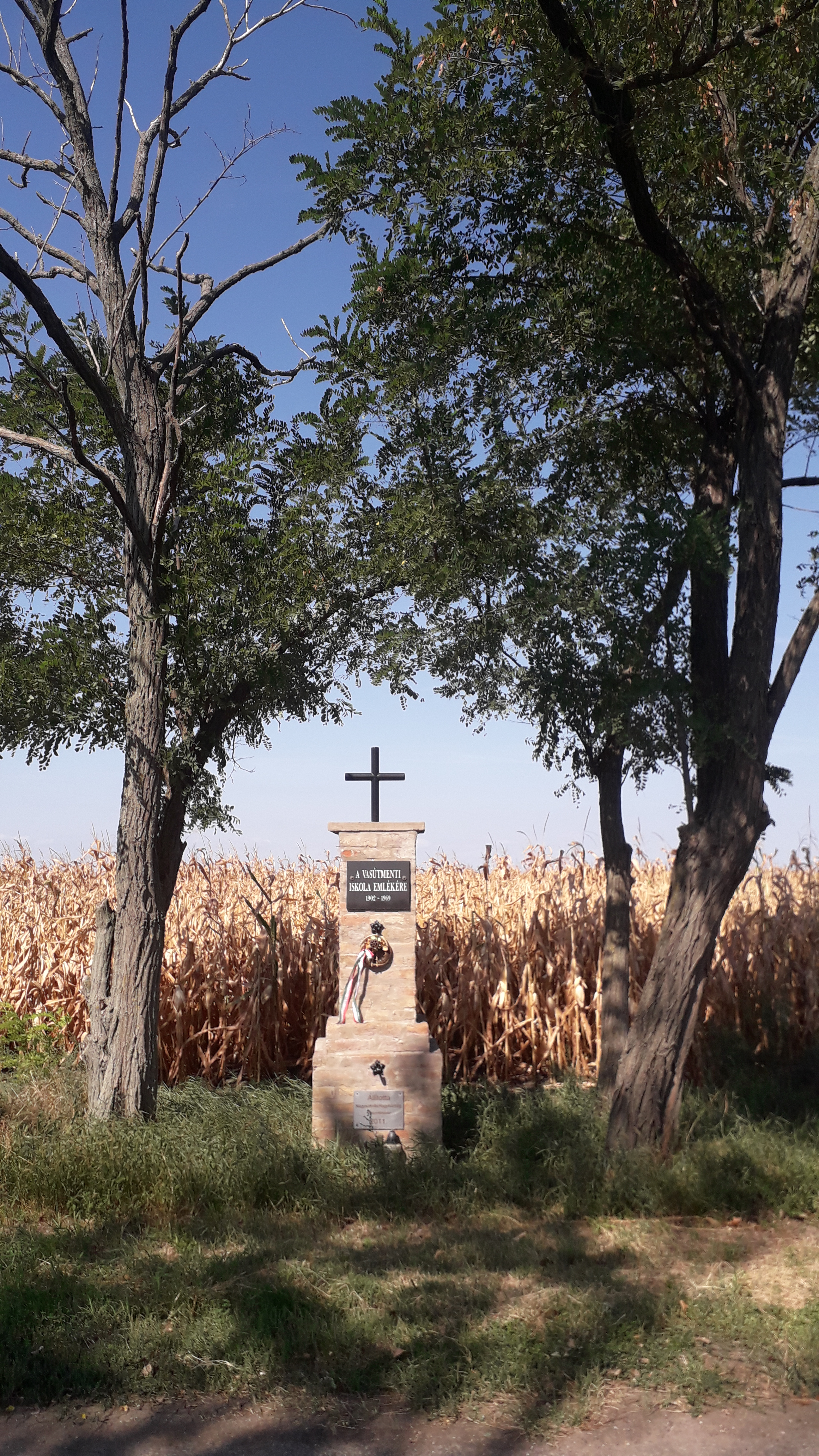 Vasútmenti Iskola emlékműve